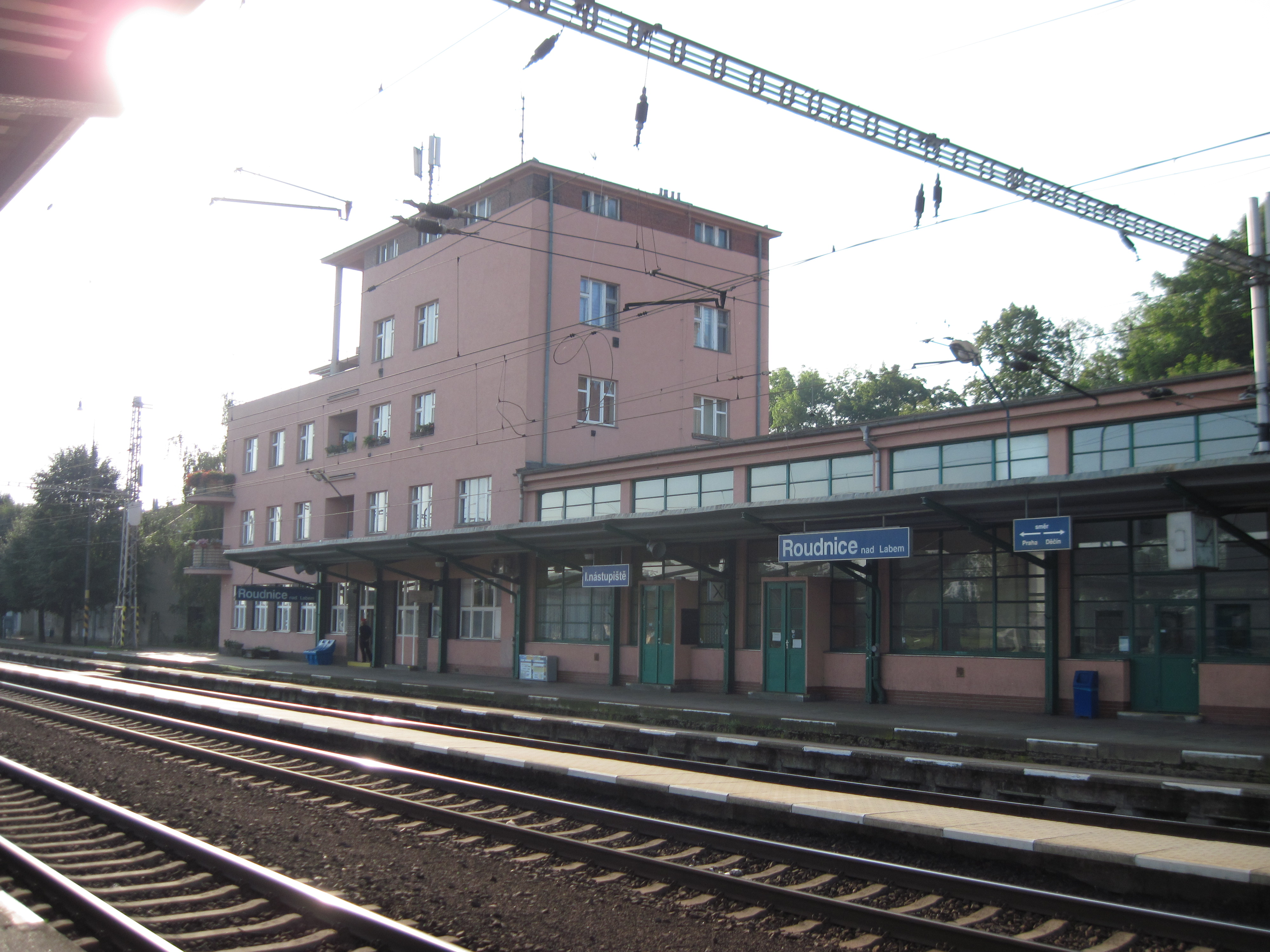 železniční stanice Roudnice nad Labem